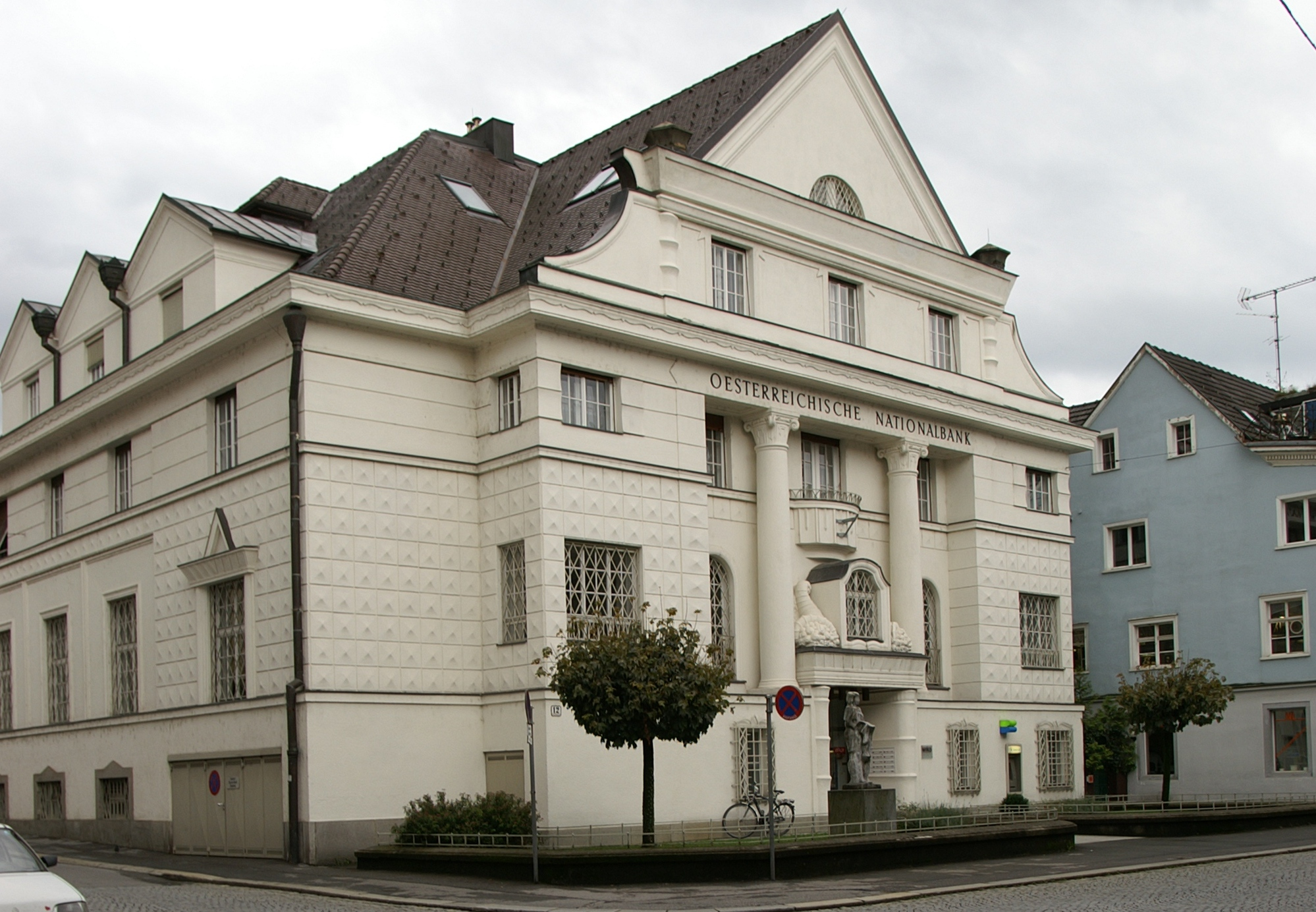 aus dem DEHIO Vorarlberg 1983: Österreichische Nationalbank erbaut von Rudolf Eisler und Ferdinand Glaser, 1925 (Ausführung Otto Mallaun). Neoklassizistischer Repräsentationsbau mit expressionistischen Details, grosser Giebel über dem Mittelrisalit, portikusartiger Eingang, darüber Füllhörner, eingestellte Säulen, diamantierte Fassade. *** In der Anton-Schneider-Strasse Nr.12, Bregenz.